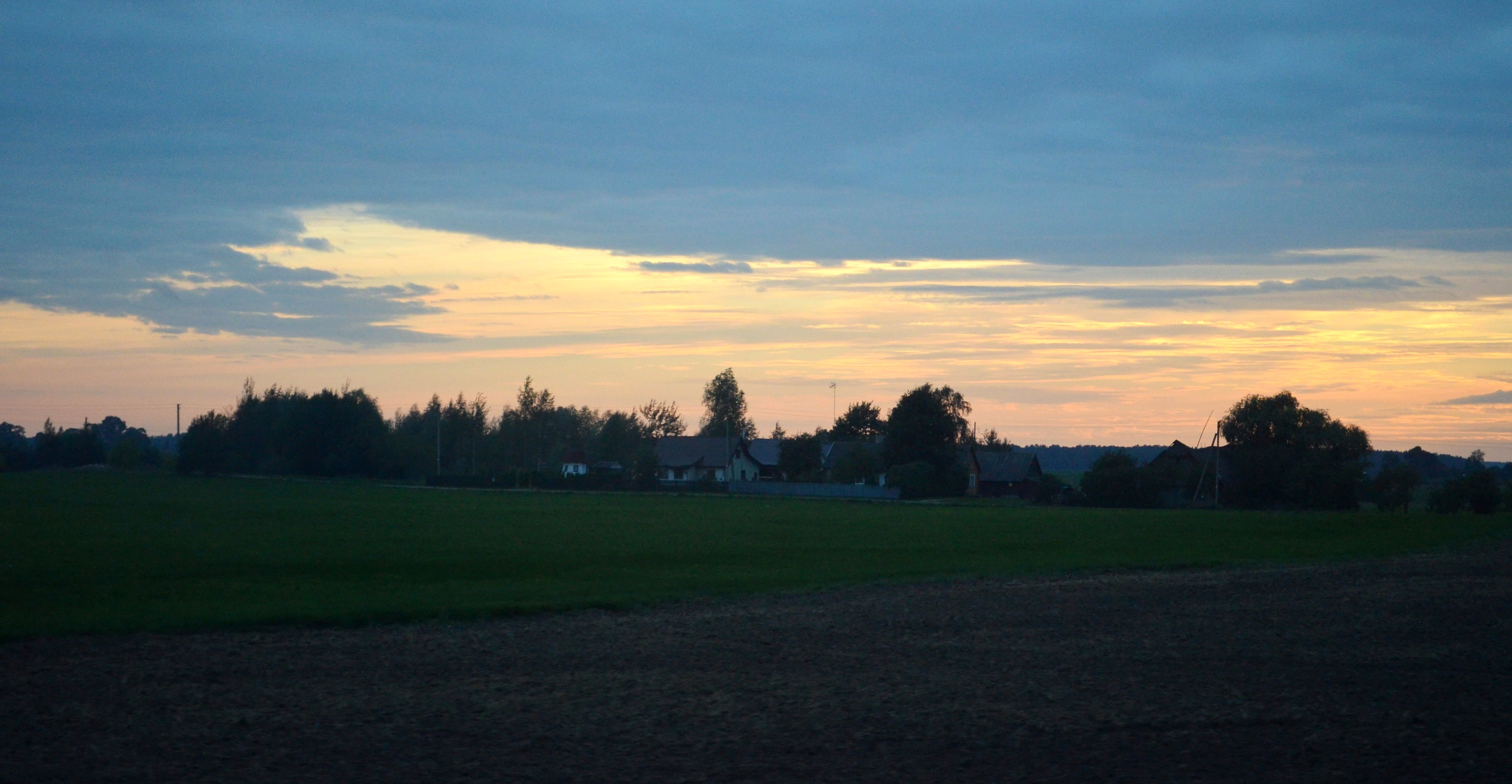 Pakaušiai, Panevėžio raj.